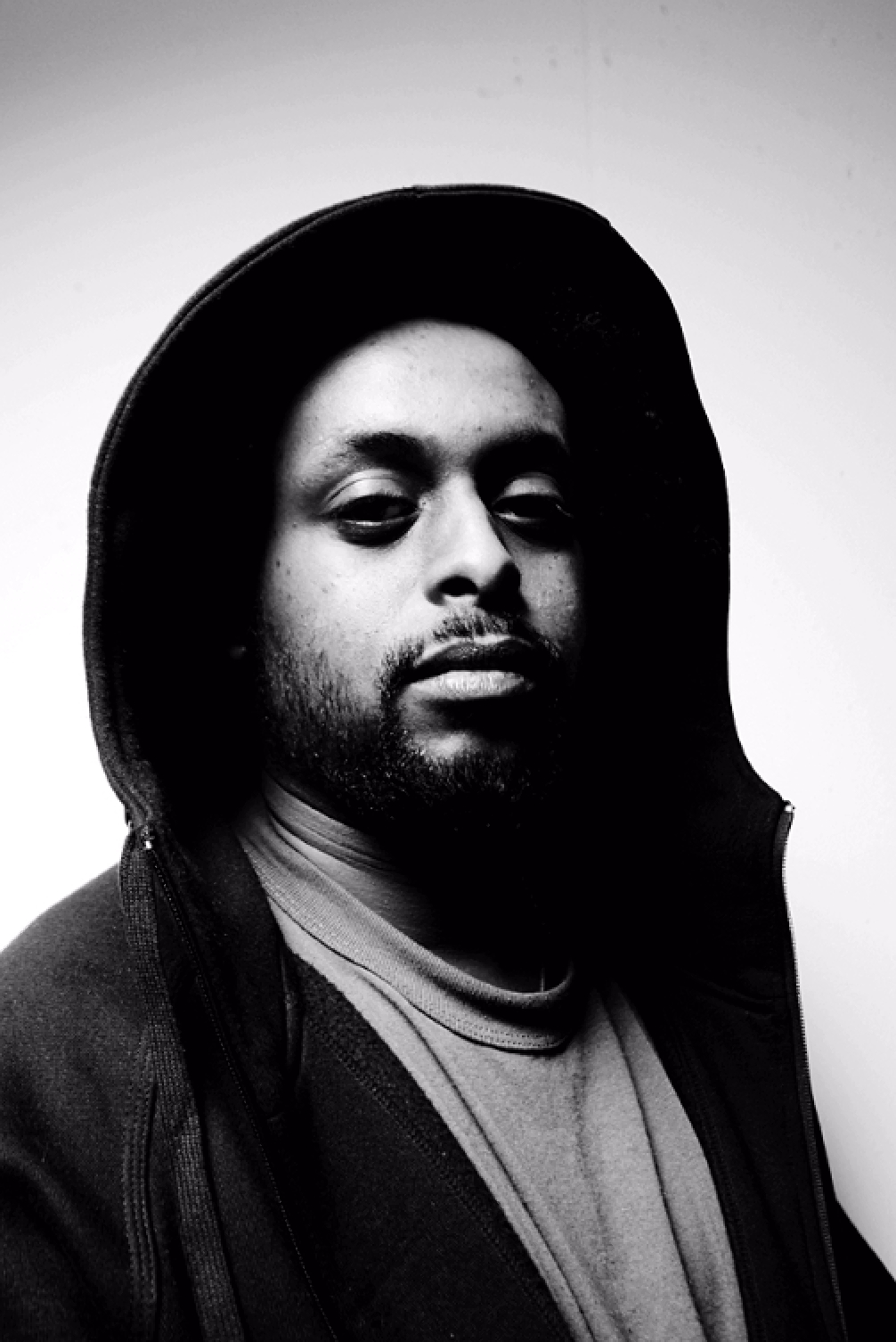 Portrait des deutschen Rappers Afrob, fotografiert von Matti Hillig. Die Aufnahme entstand am 19.01.2005 in Berlin Kreuzberg. Afrob heisst mit bürgerlichem Namen Robert Zemichiel und ist Deutscher eritreischer Herkunft. Höhere Auflösung von diesem und weiteren Fotos sind verfügbar. Bitte kontaktieren Sie mich unter